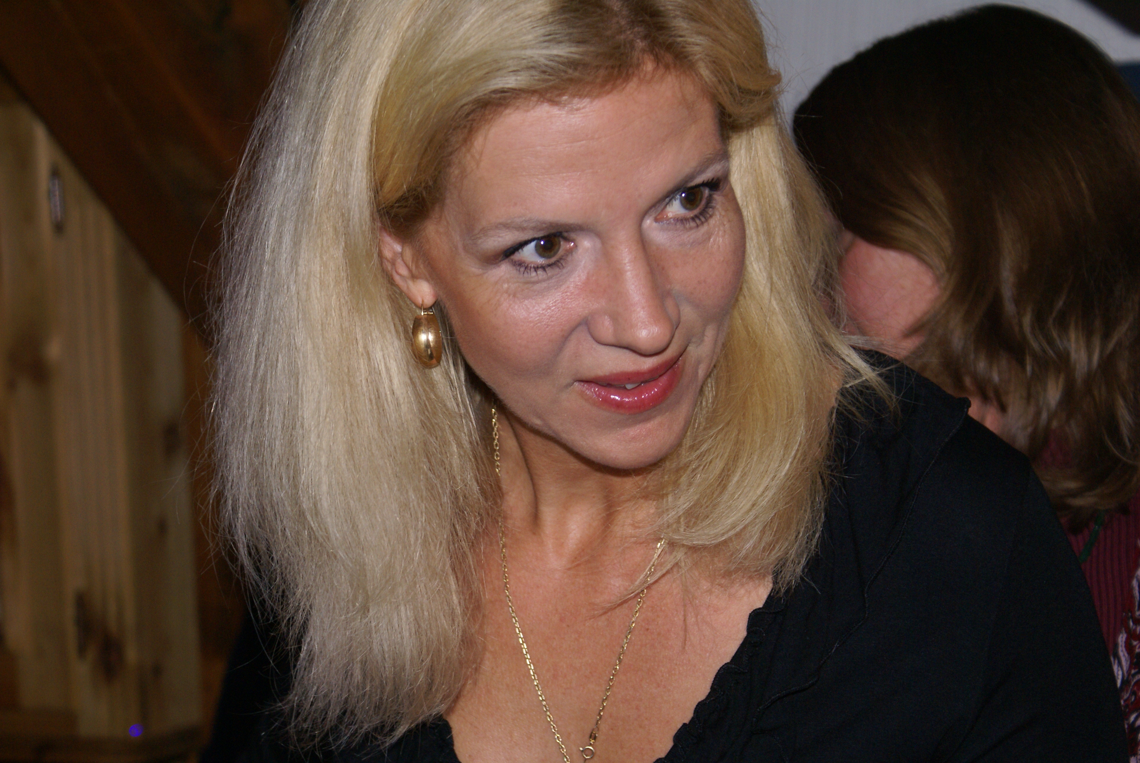 Liza Marklund bei einer Veranstaltung im Rahmen des Krimifestivals Mord am Hellweg in Werne am 1. November 2008